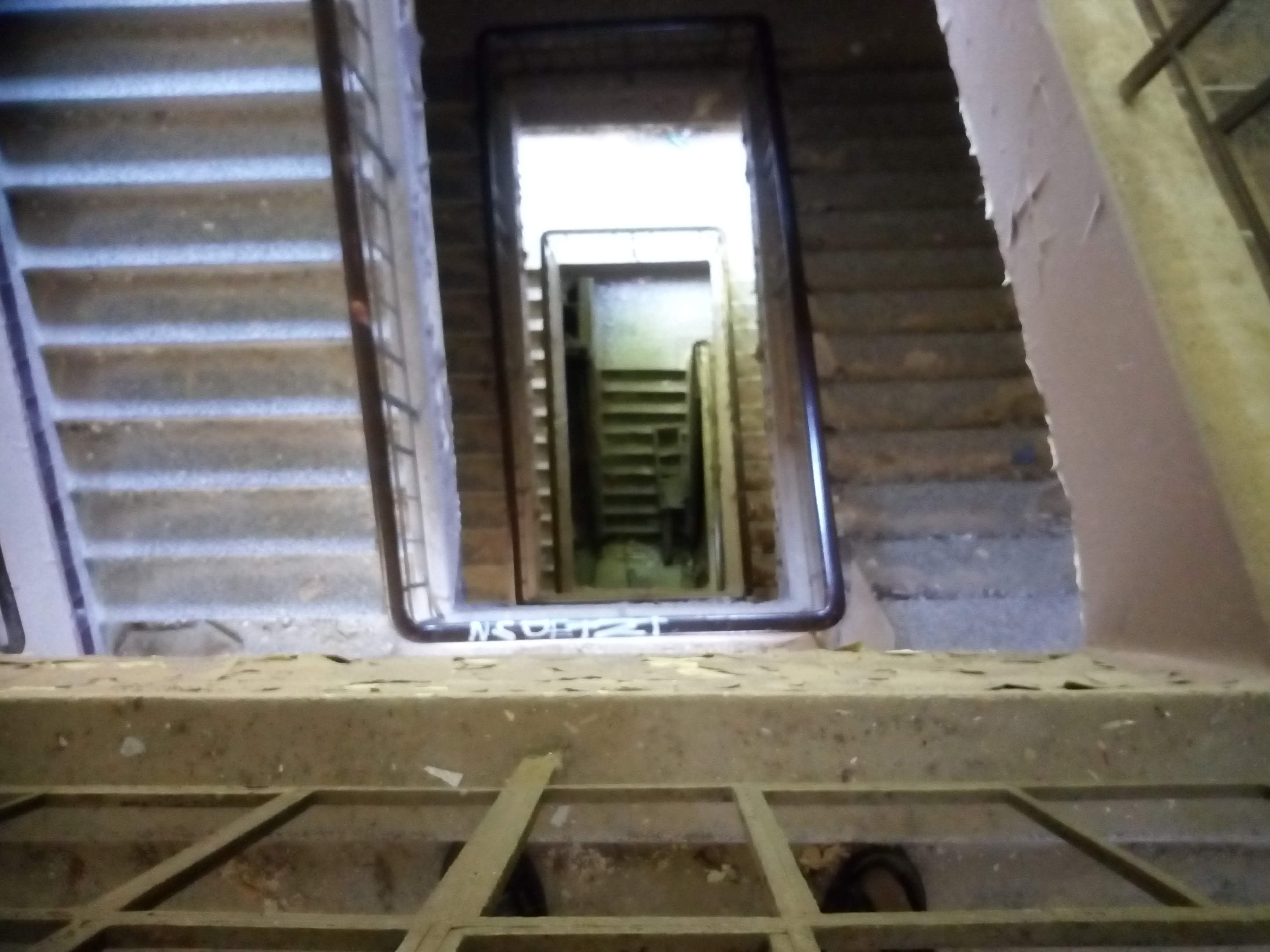 Sophienheilstätte Bad Berka-München